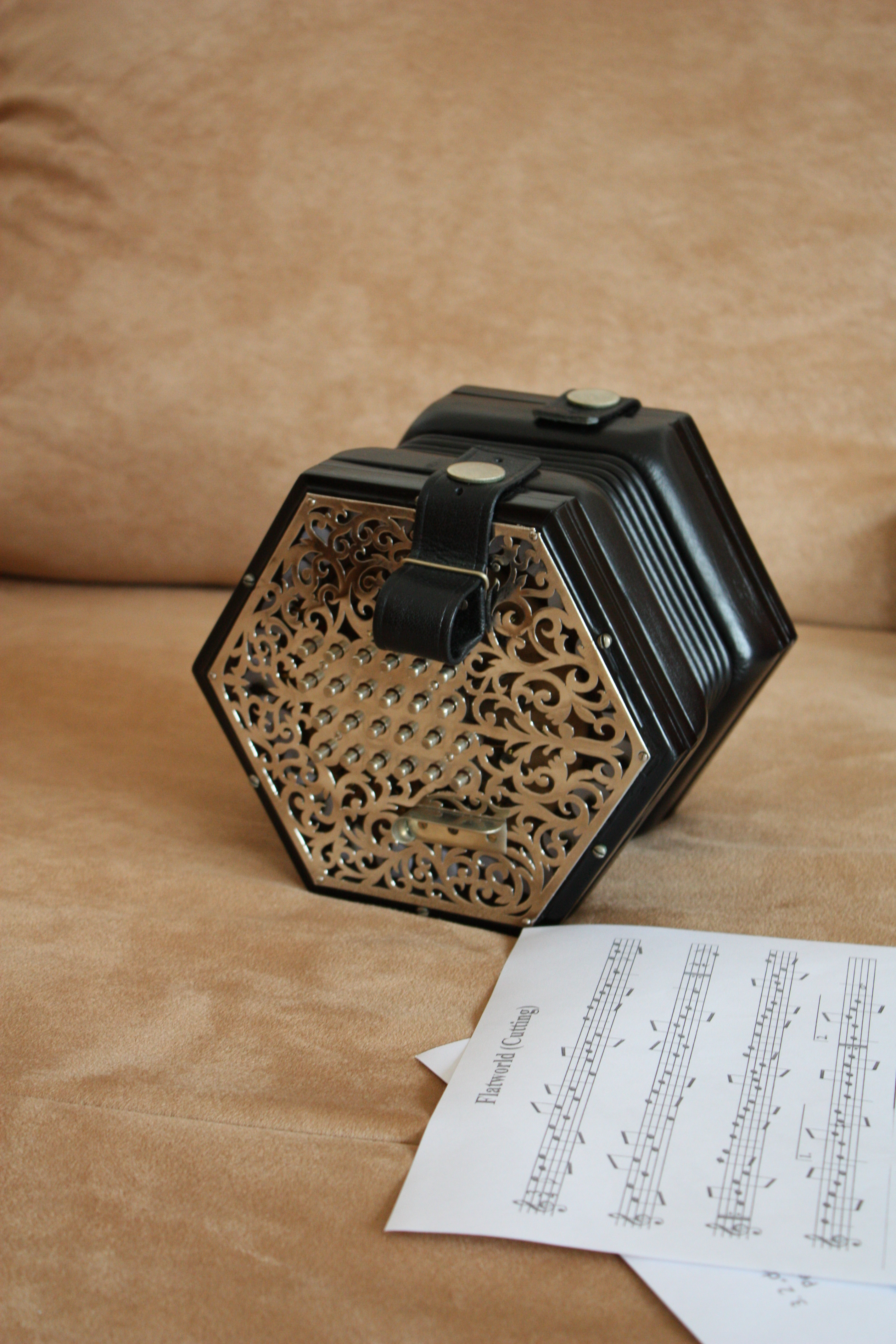 Lachenal English Concertina, ca 1895